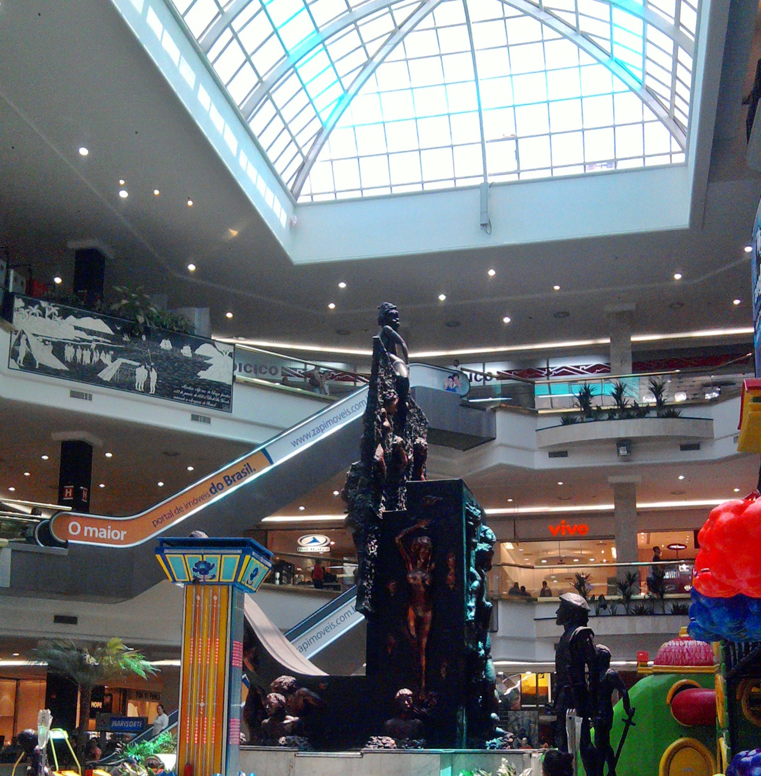 Praiamar Shopping, localizado na Rua Alexandre Martins, 80 - Santos, São Paulo, Brasil